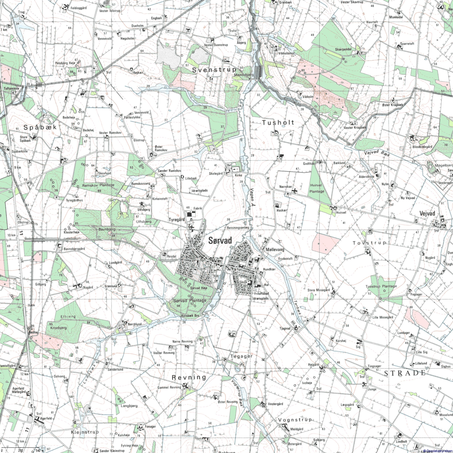 Udsnit af 4 cm kort i 1:25.000, målt 1980-2001